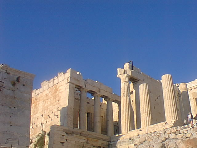 Athina - Propylaea